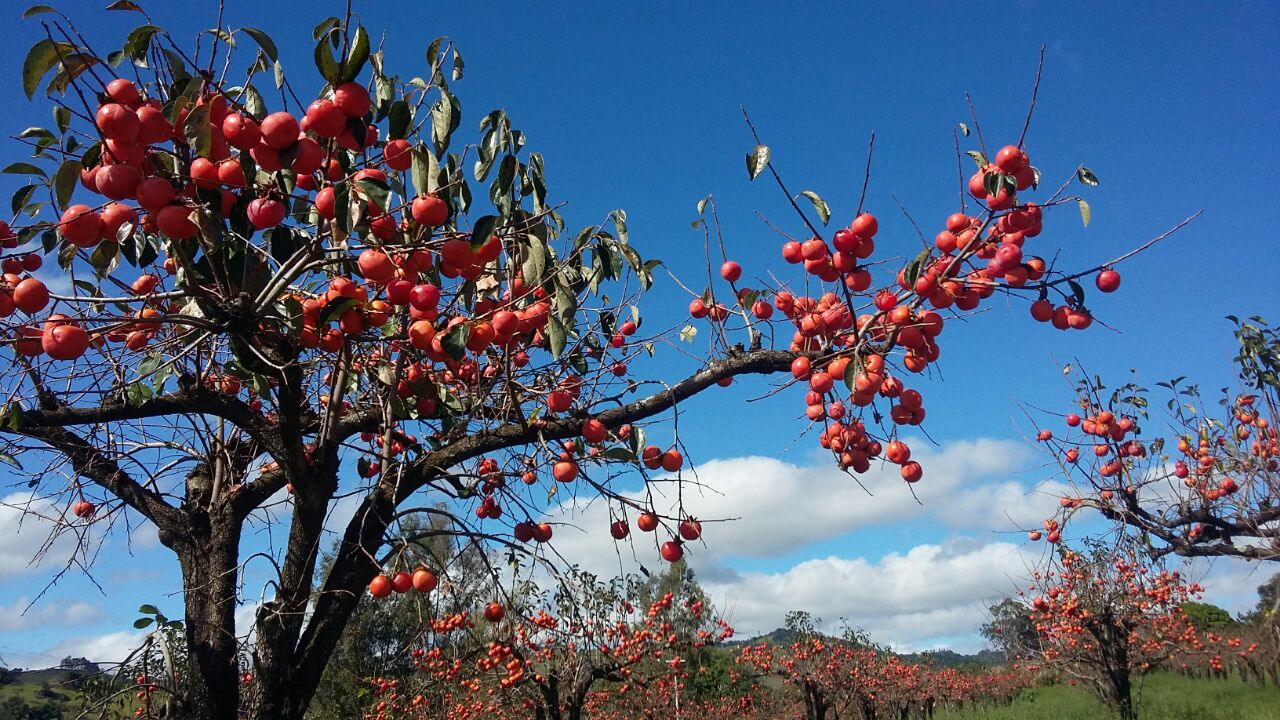 Plantação no interior de São Paulo, Brasil.